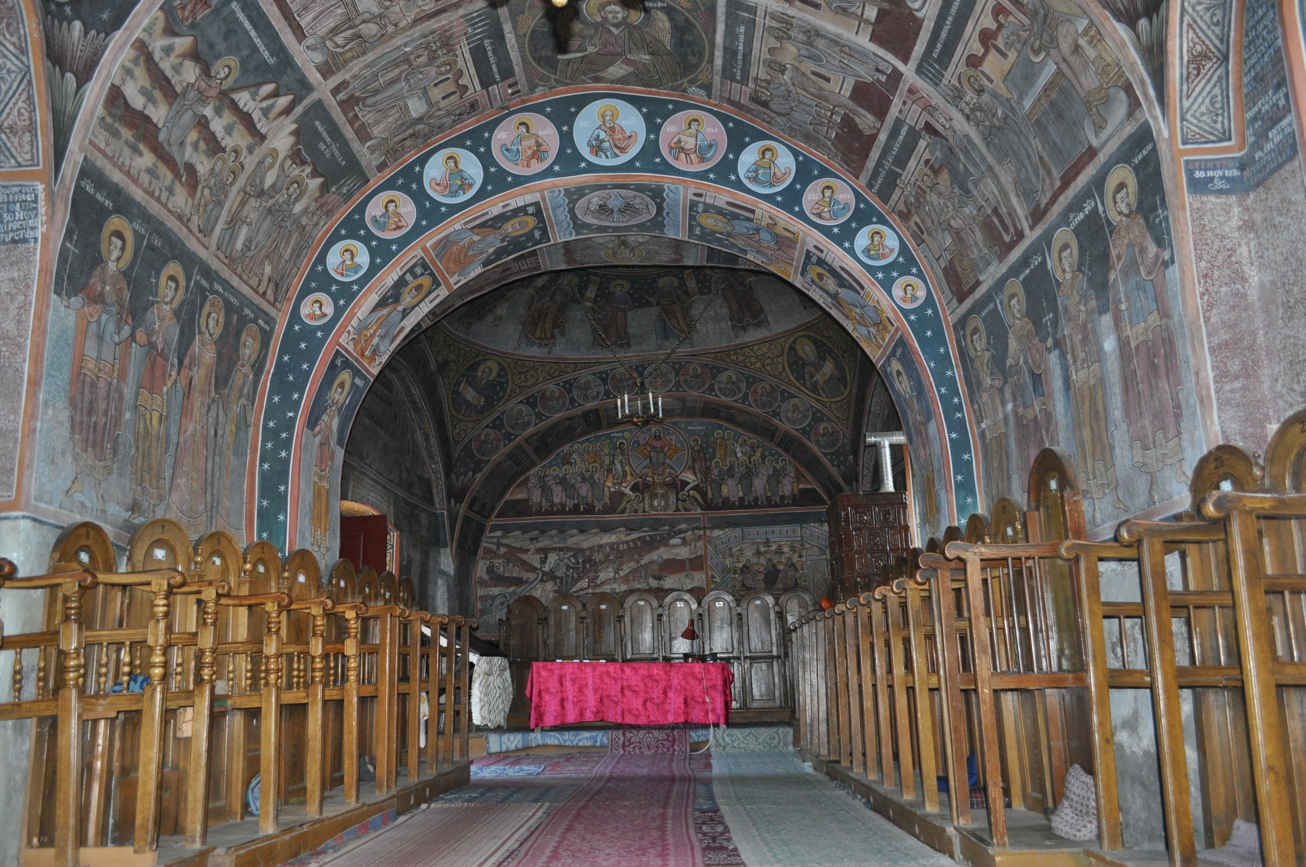 Biserica ortodoxă „Sfânta Treime”